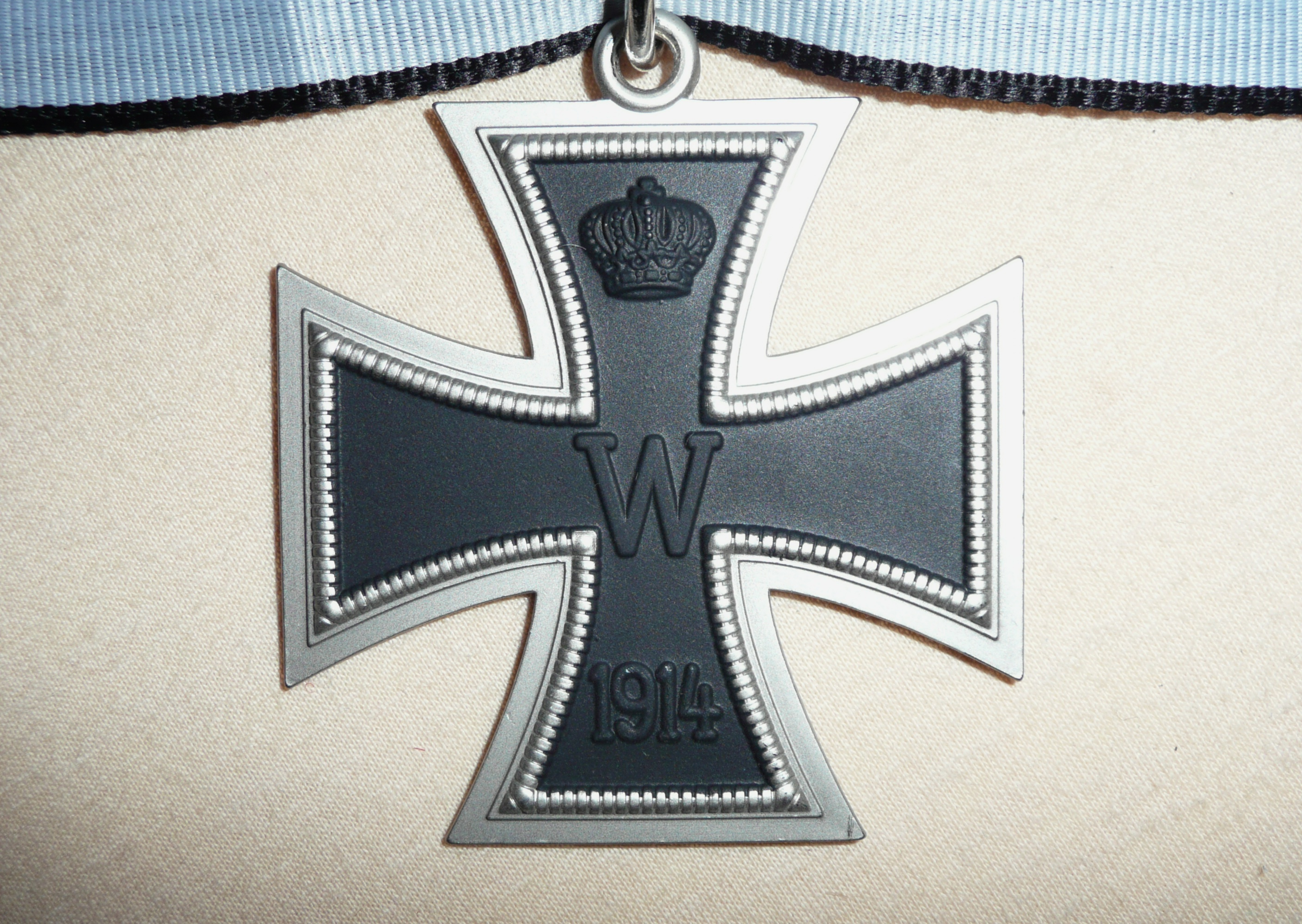 Vorderseite des Grosskreuzes von 1914